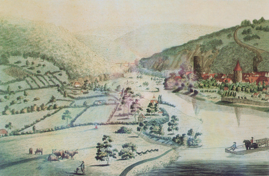 Kupferstich von Altmünden 1791